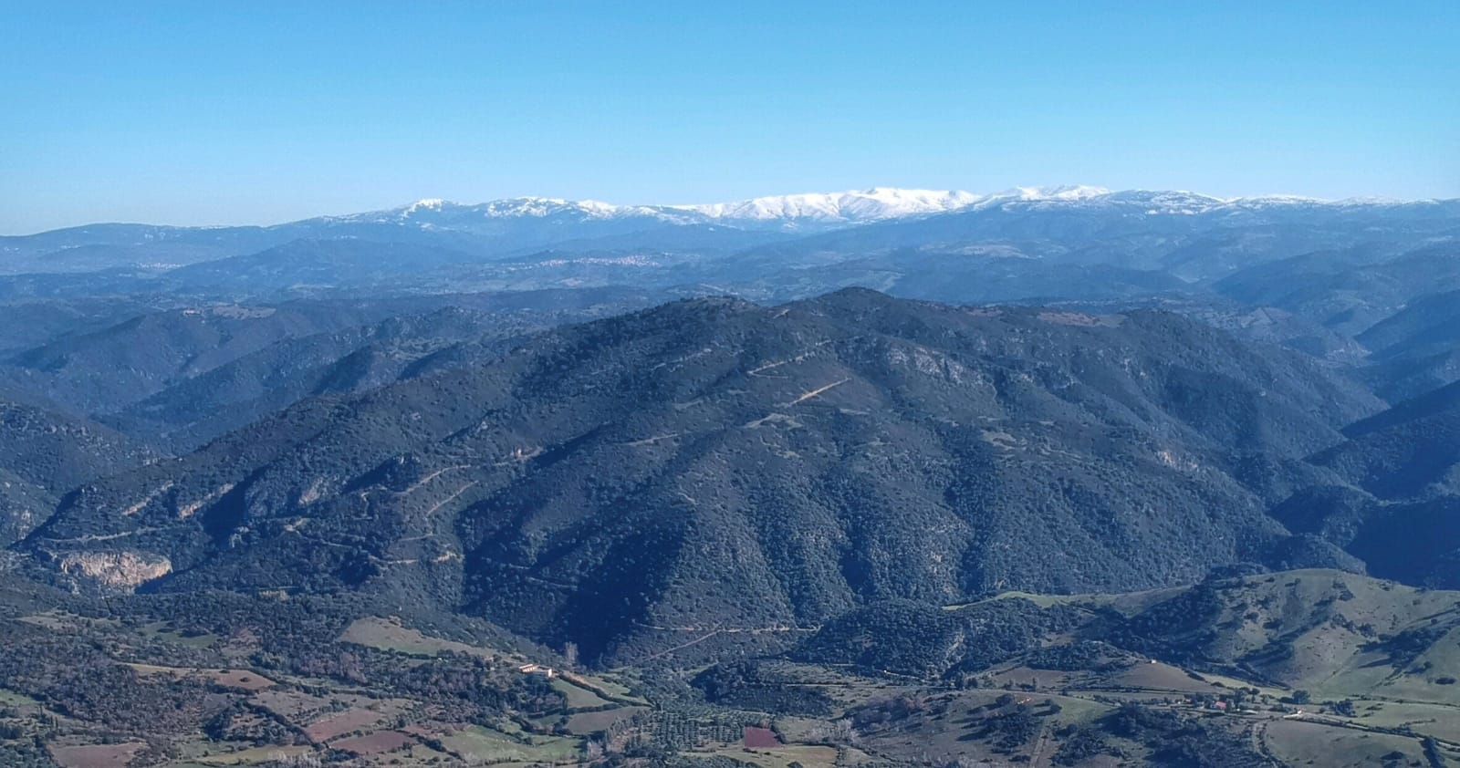 Versanti occidentali del Monte Ualla. Sullo sfondo, il Gennargentu innevato.